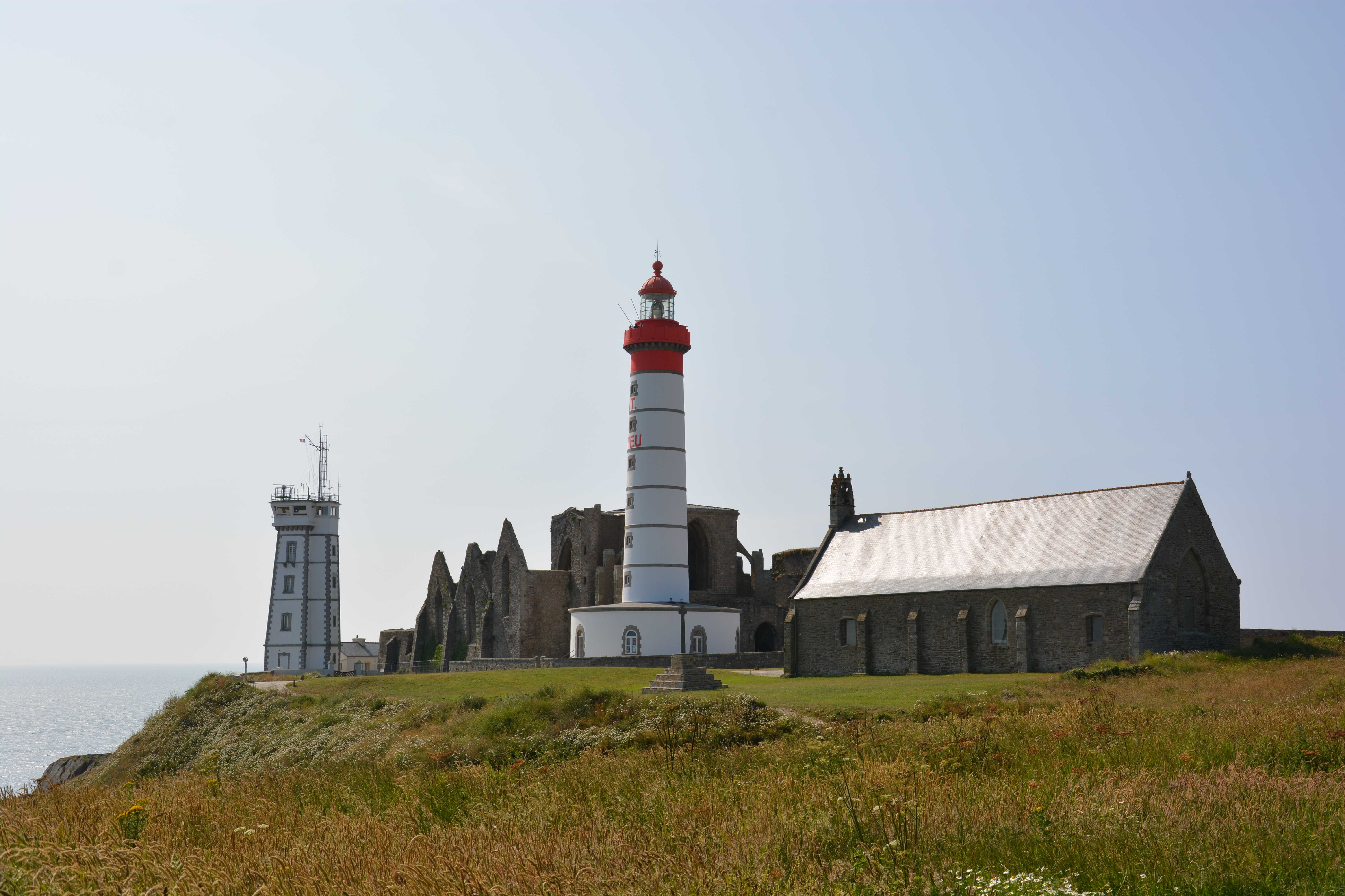 Pointe Saint-Mathieu. Phare de Saint-Mathieu. Abbaye Saint-Mathieu de Fine-Terre. Sémaphore.